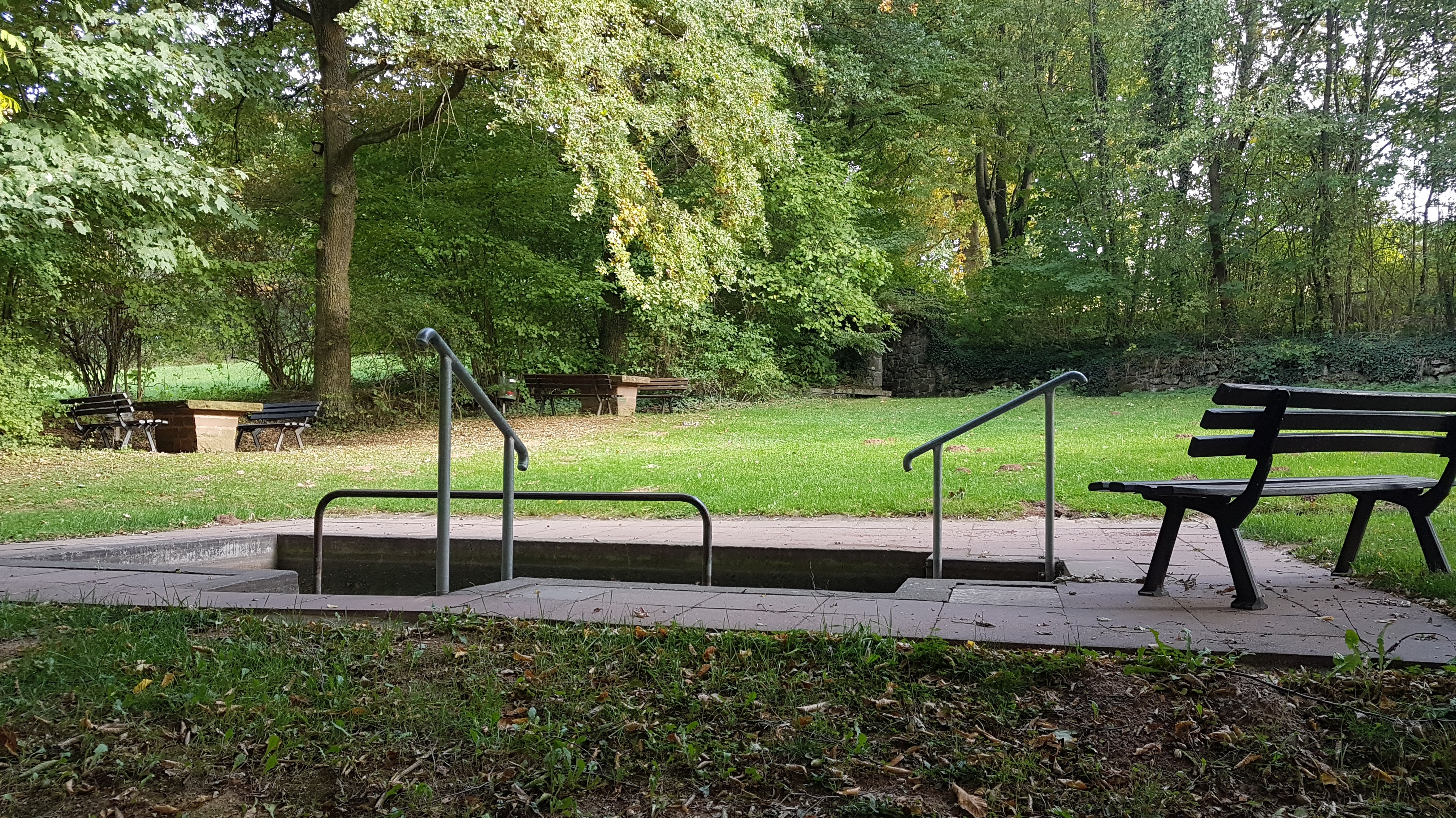 Kneipp-Anlage (Külsheim) Die Külsheimer Kneipp-Anlage liegt etwa zwei Kilometer nordöstlich von Külsheim im Amorsbachtal. In einer Mariengrotte entspringt eine Quelle, die das Becken der Kneipp-Anlage mit Wasser speist.